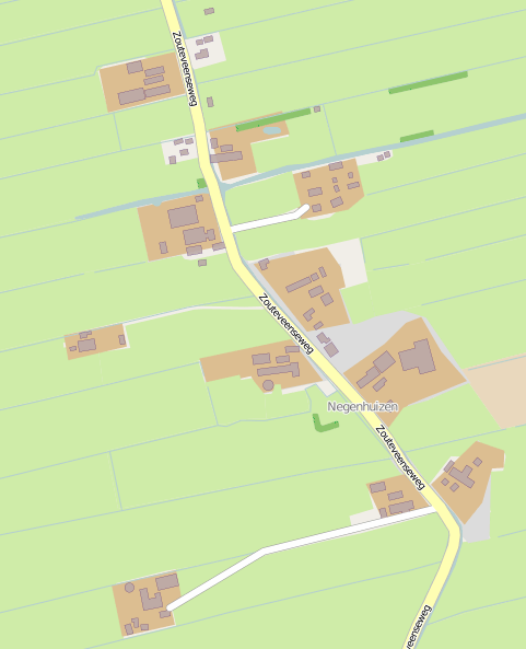 geografische kaart via [1]